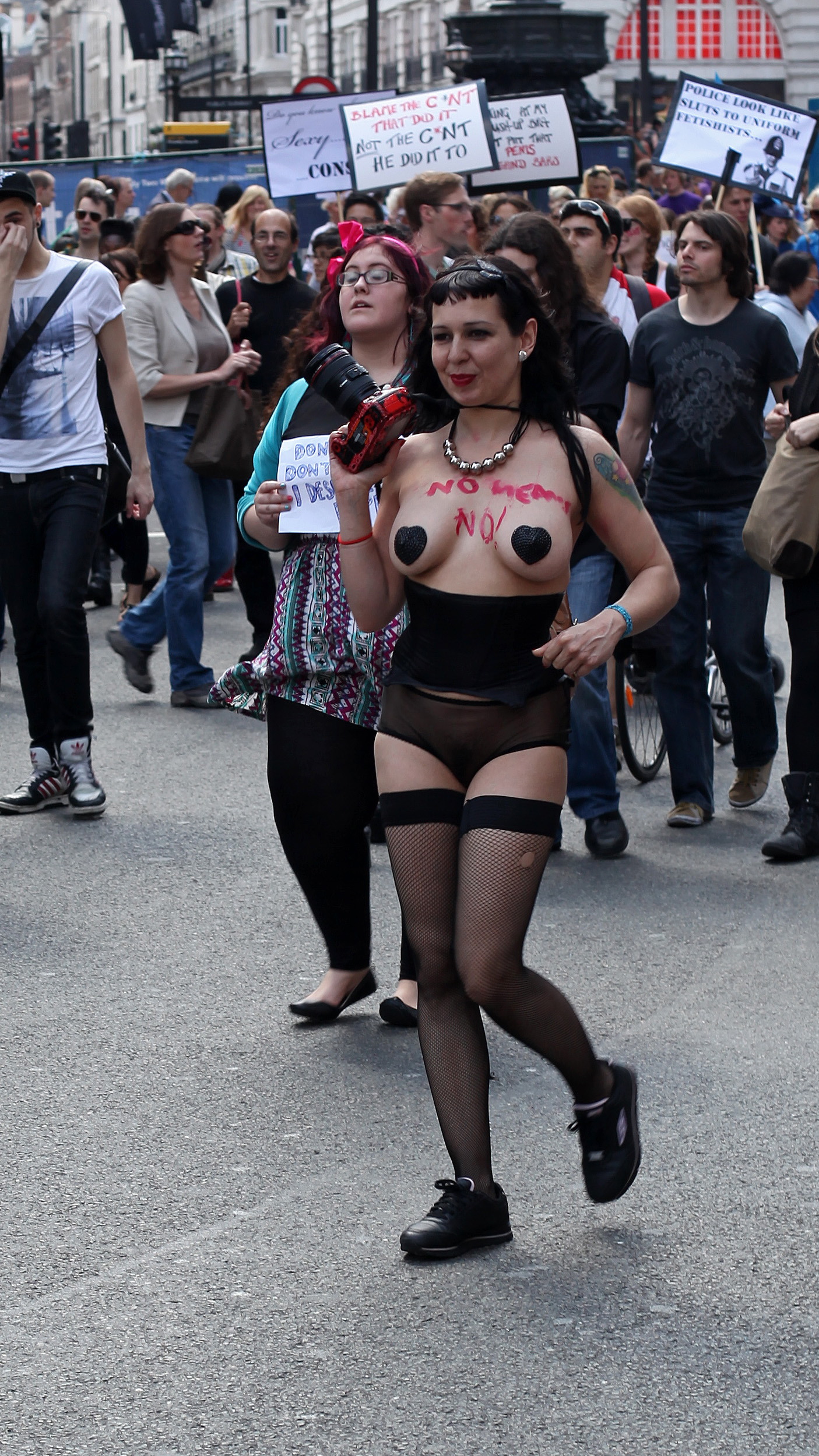 Slut Walk London .uk/